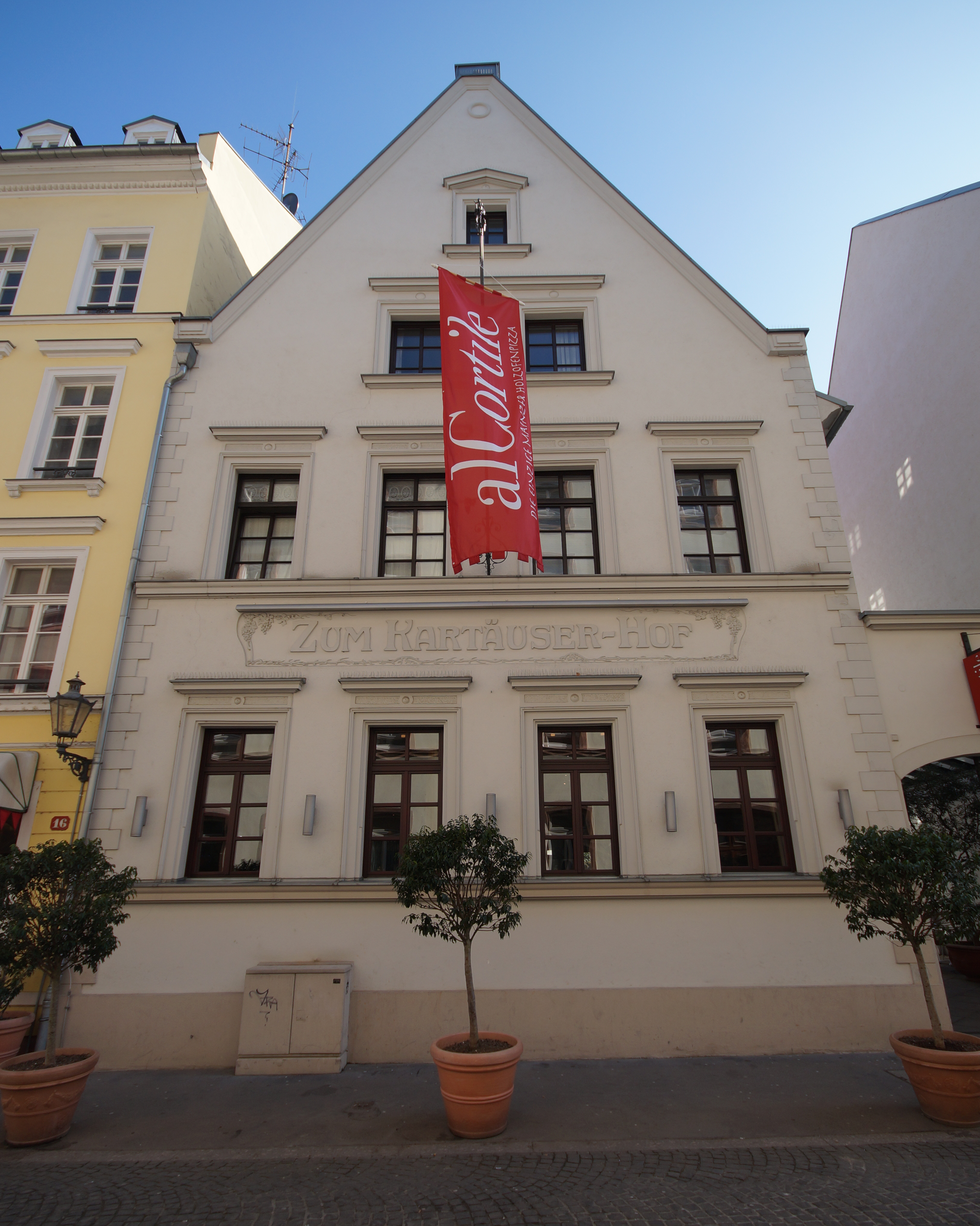 Fassade des Hauses Kartäuserstraße 14 (Zum Kartäuser-Hof) in Mainz-Altstadt